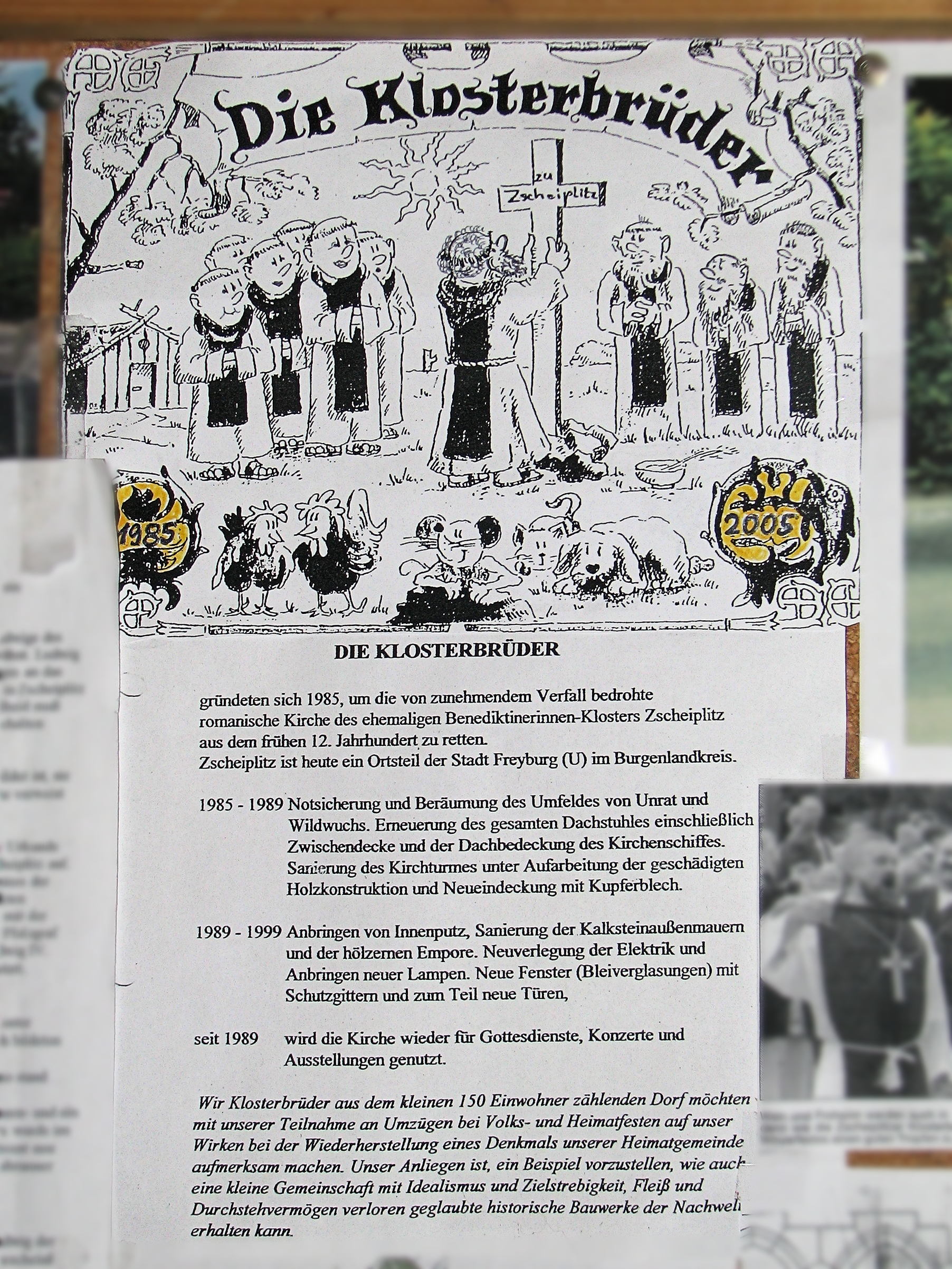 Aushang des Fördervereins Kloster Zscheiplitz Klosterbrüder e.V., im Dez. 1984 gegründet unter dem Namen Interessengemeinschaft Klosterkirche Zscheiplitz (IGZ), in der Klosterkirche Zeiplitsch zum 20jährigen Bestehen des Vereins